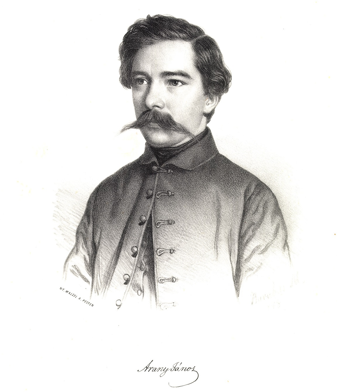 Arany János (Nagyszalonta, 1817. március 2. – Budapest, 1882. október 22.) magyar költő, a Kisfaludy Társaság igazgatója, a Magyar Tudományos Akadémia tagja és főtitkára.